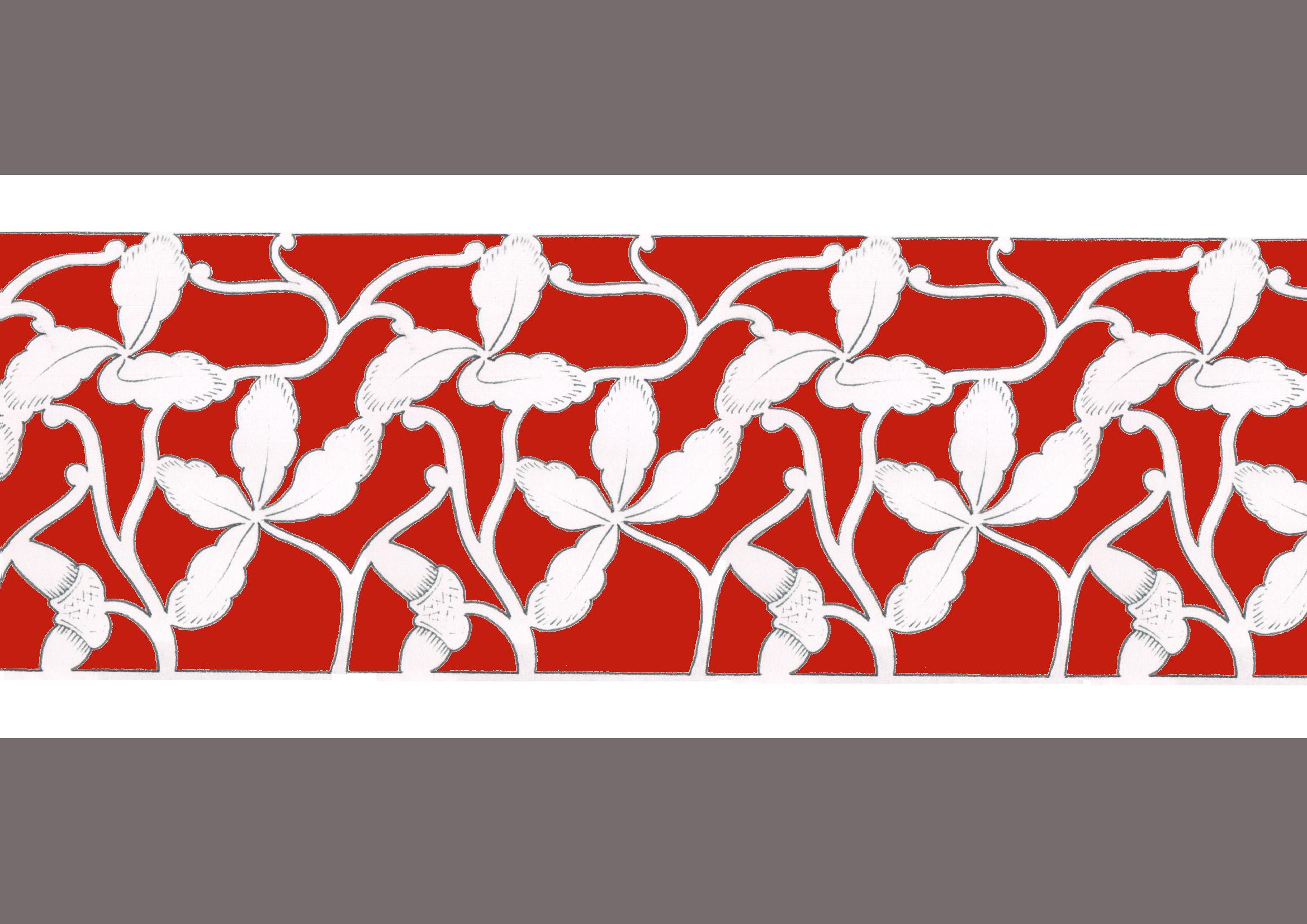 Ein für Spahr typisches, sich umlaufend wiederholendes Motiv (hier: stylisierte Eicheln und Blätter)